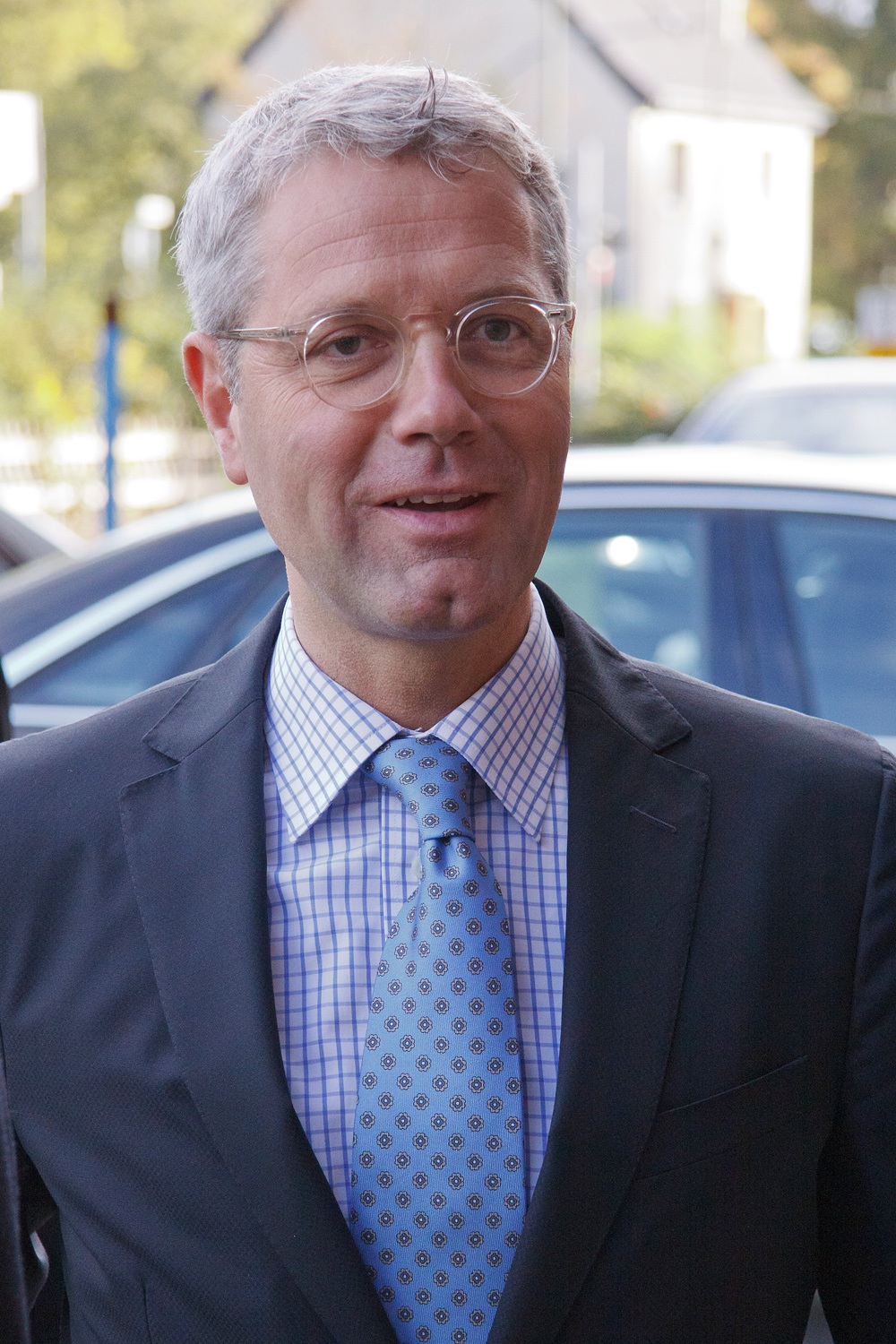 Bundesumweltminister Norbert Röttgen (CDU) in Hamm